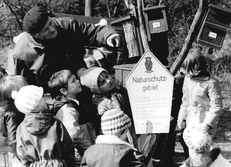 Bad Freienwalde, Naturkunde für Kinder ADN-ZB Müller-4.5.1979-Zum Beirag: Es zöge mancher Storch ncht am Himmel - Von einem Mann, der für den Naturschutz lebt. Das Naturschutzsymbol der DDR, die stilisierte Waldohreule, wurde nach einer Idee von Kurt Kretschmann geschaffen, der auf dem Boasberg, in Bad Freienwalde (Bez. Frankfurt-Oder) lebt und sich seit vielen Jahren dem Naturschutz verschrieben hat. Hiert erteilt er Kindern aus einem nahegelegenen Kindergarten sehr lebendigen Biologie "Unterricht". Im Lauf vieler Jahre schuf Kurt Kretschmann gemeinsam mit seiner Frau Erna auf dem Dossberg ein wahres Pflanzenparadiese mit vielen Raritäten. Daneben sind hier auch siebzig Modelle aus Naturkunde und Naturschutz zu besichtigen. (Bitte beachten Sie hierzu auch 0504--300N und 302N)